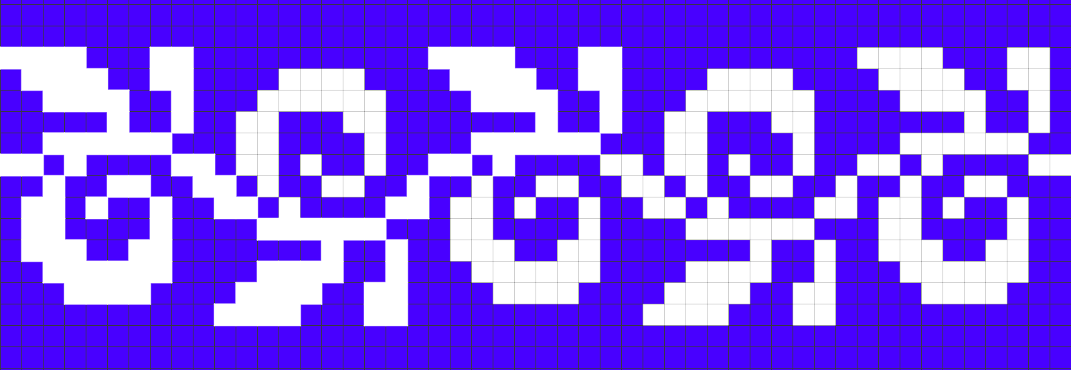 Motif tricot norvégien, frise storkrokinn